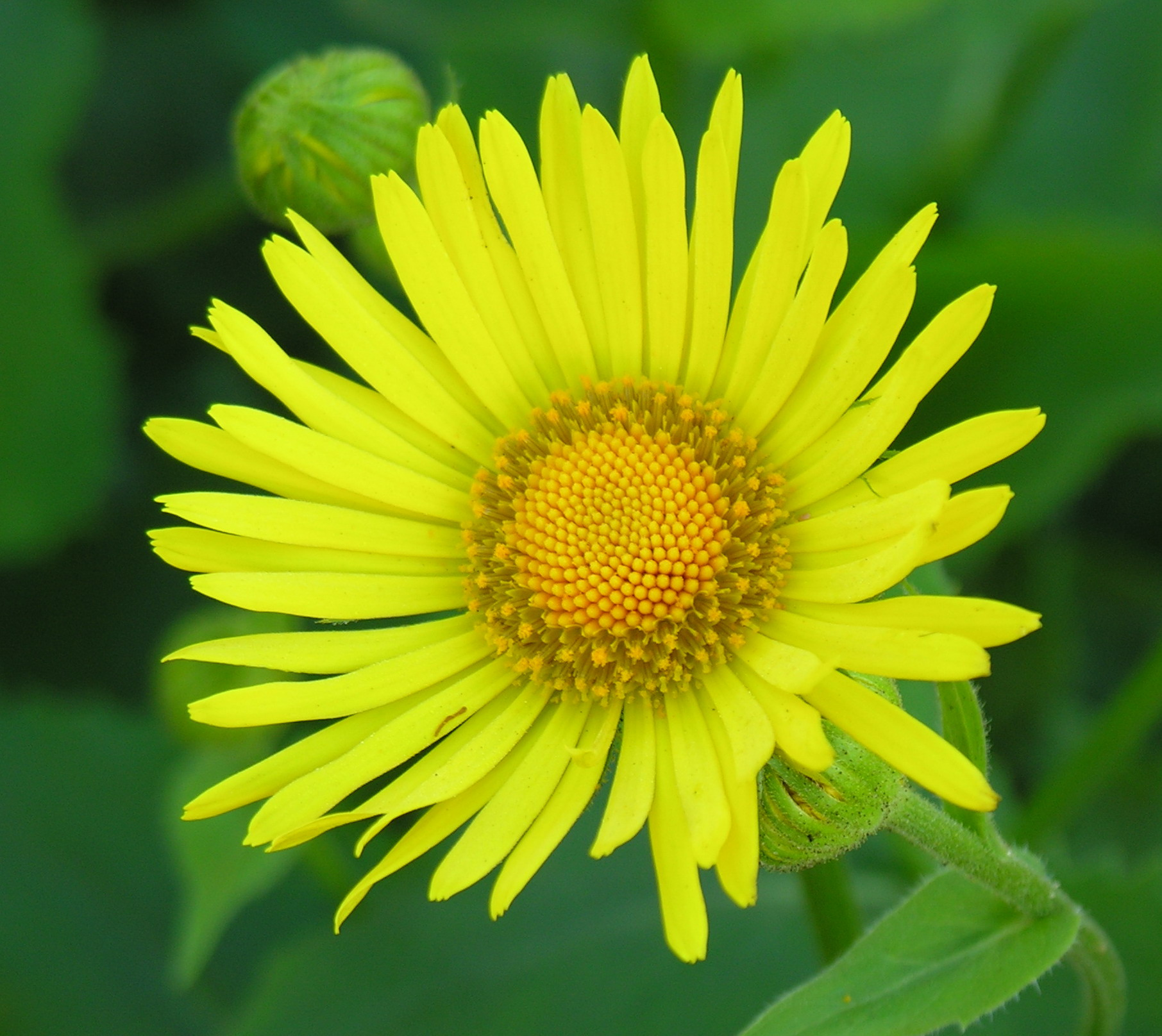 Rytinės laumenės (Doronicum orientale) žiedas Šeima. Astriniai (Asteraceae) Fotografavo: Algirdas, 2006 m. gegužės 10 d., Lietuva